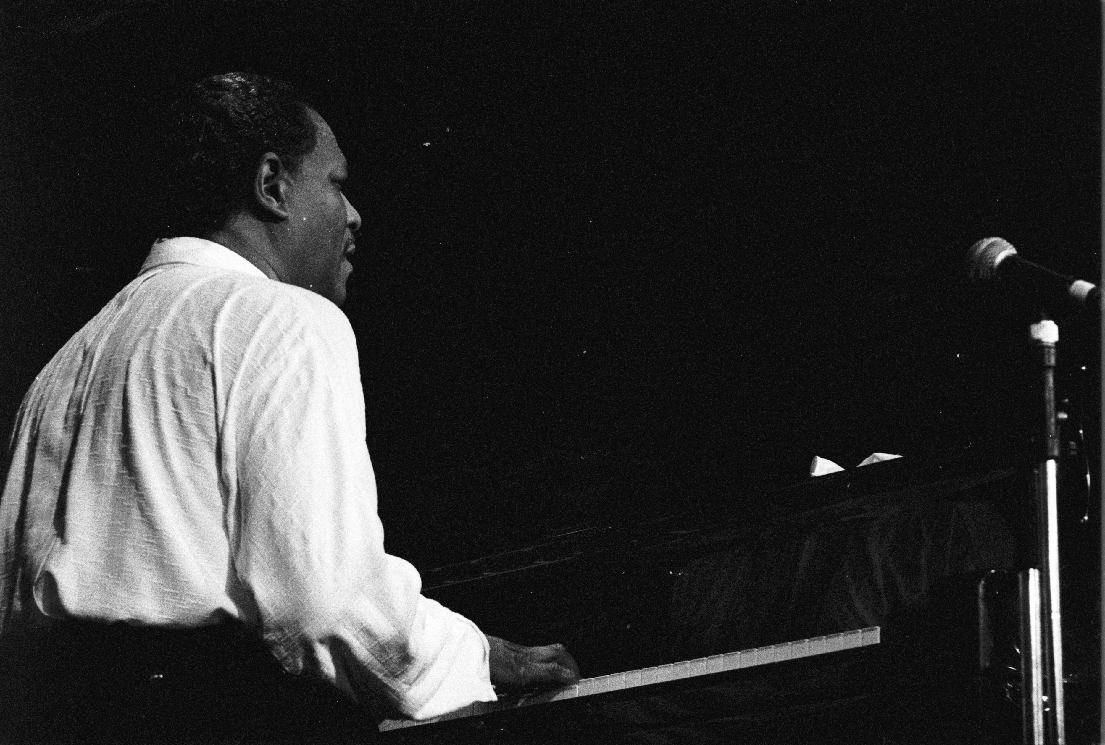 Le pianiste américain de jazz McCoy Tyner en concert à Deauville (Normandie, France) en 1989.